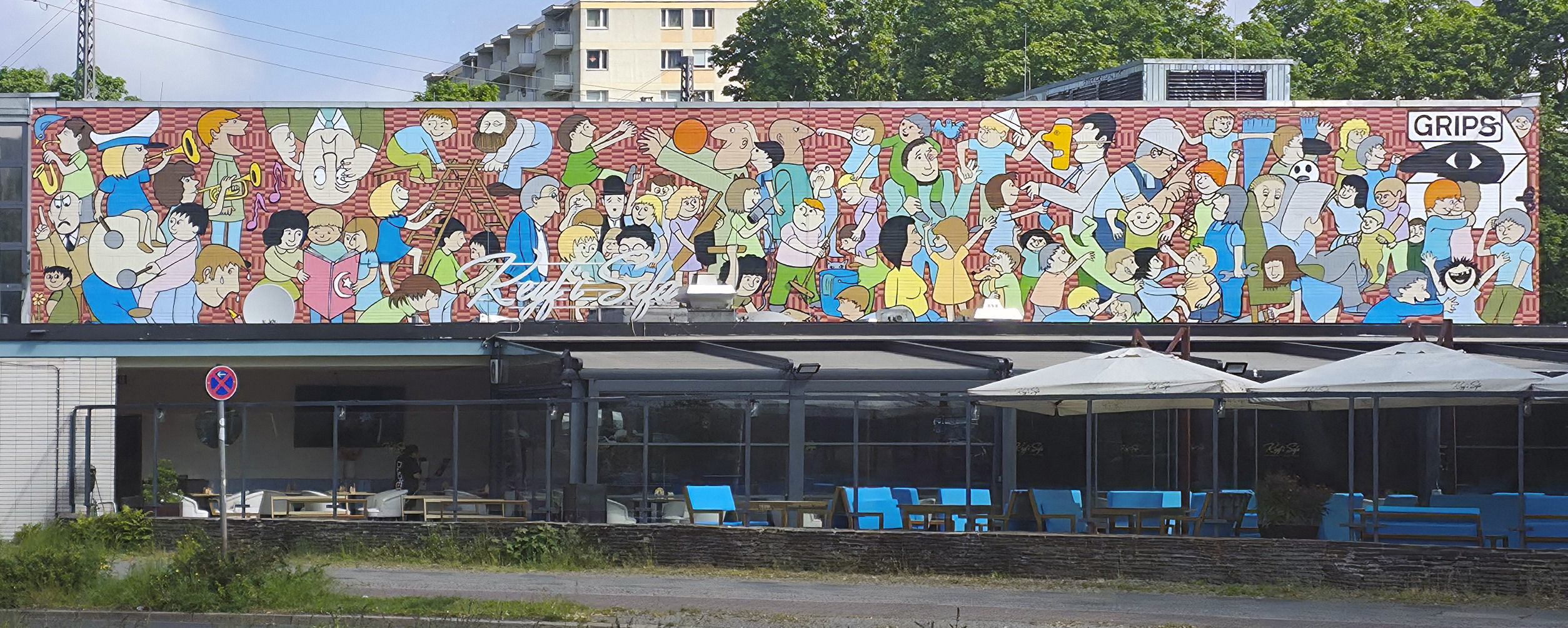 Mosaik, Grips-Theater nach einer Zeichnung von Rainer Hachfeld, Altonaer Straße 22, Berlin-Hansaviertel, Deutschland